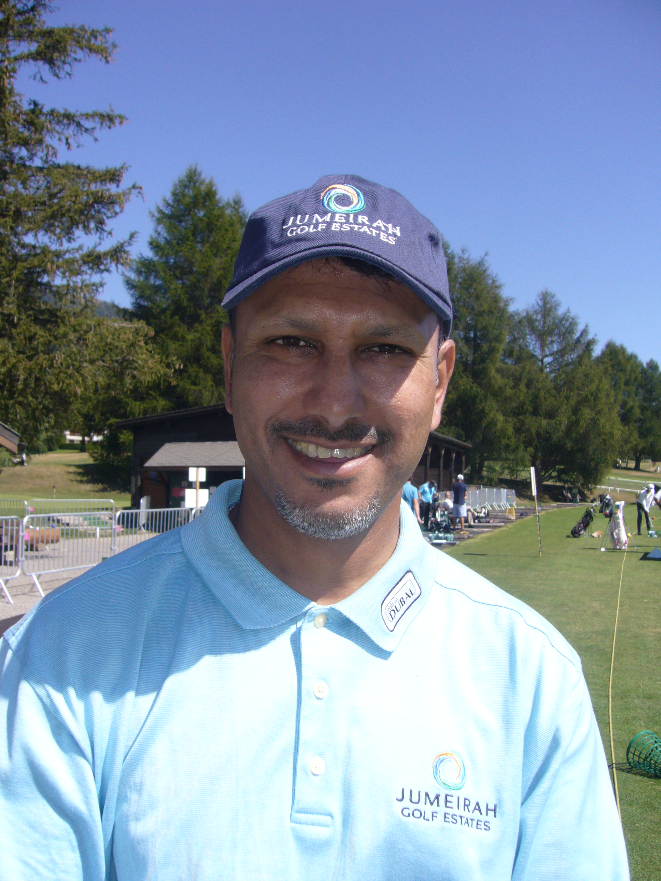 Jeev Milkha Singh op EUropean Masters in Crans